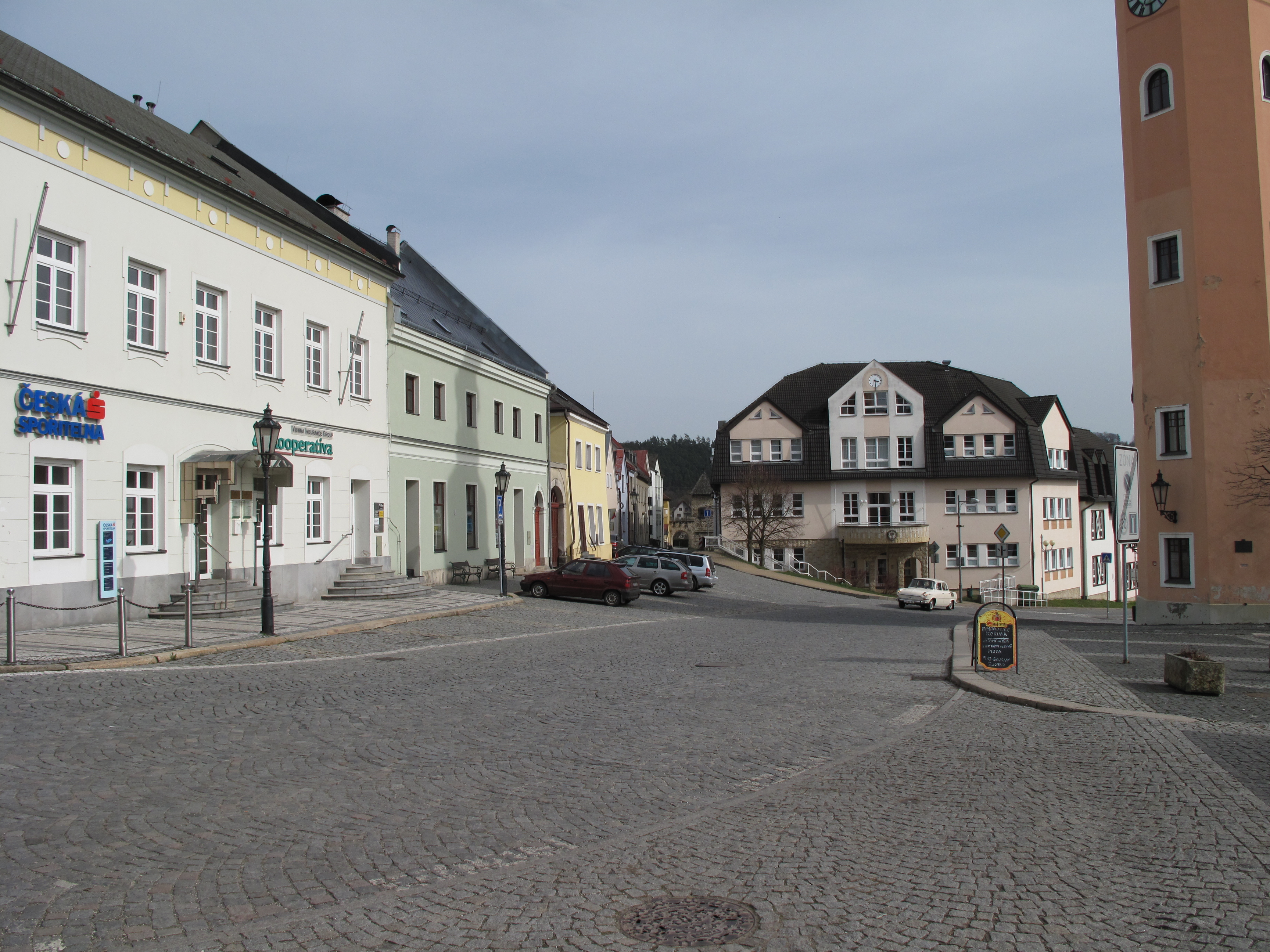 Český Dub I. Okres Liberec, Česká republika. Náměstí Bedřicha Smetany, pohled ke škole.